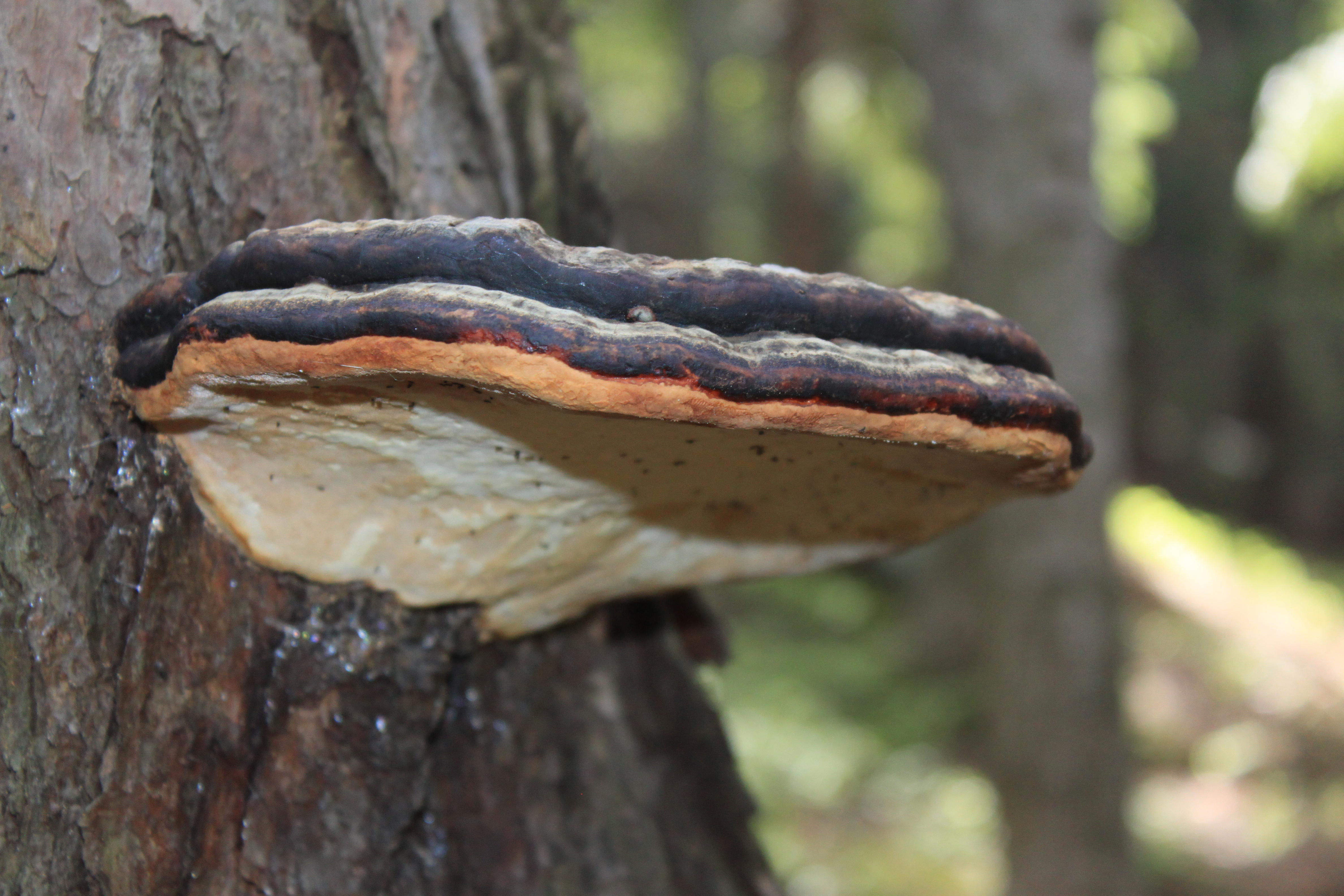 Ein Rotrandiger Baumschwamm (Fomitopsis pinicola), gut erkennbar seine beiden Wachstumsphasen